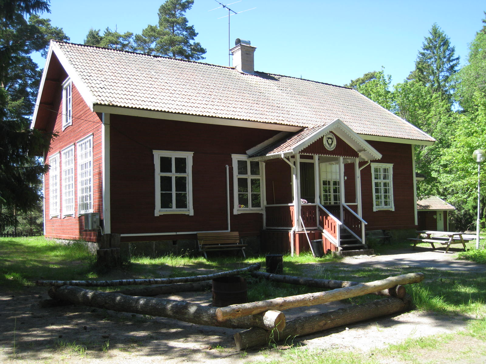 Görvälns skola i Järfälla, Stockholms län, byggdes 1896 och var i bruk som skola till 1939. Sedan 1994 ägs Görvälns gamla skola av föreningen Motorcykelentusiasterna.